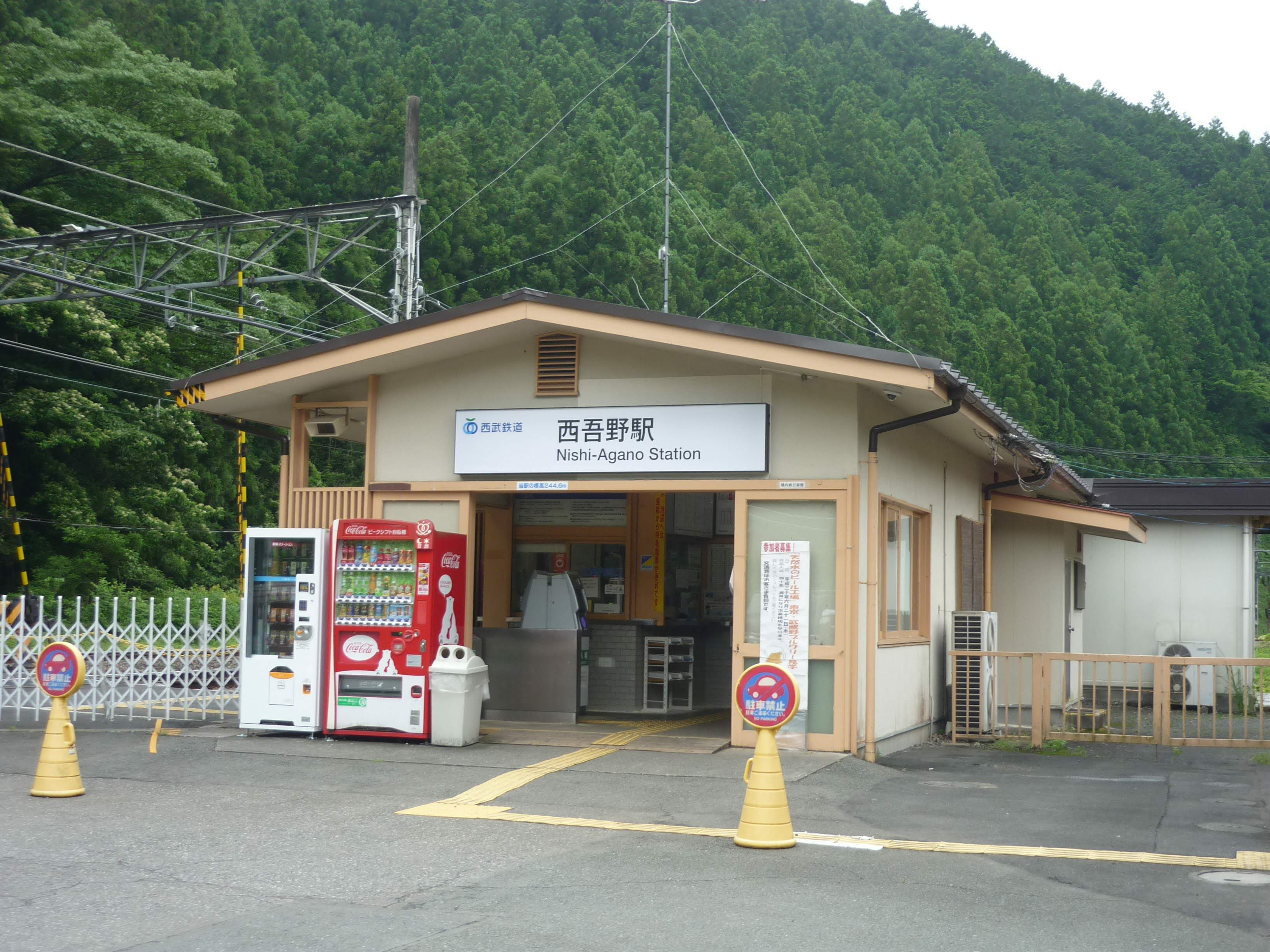 西吾野駅駅舎